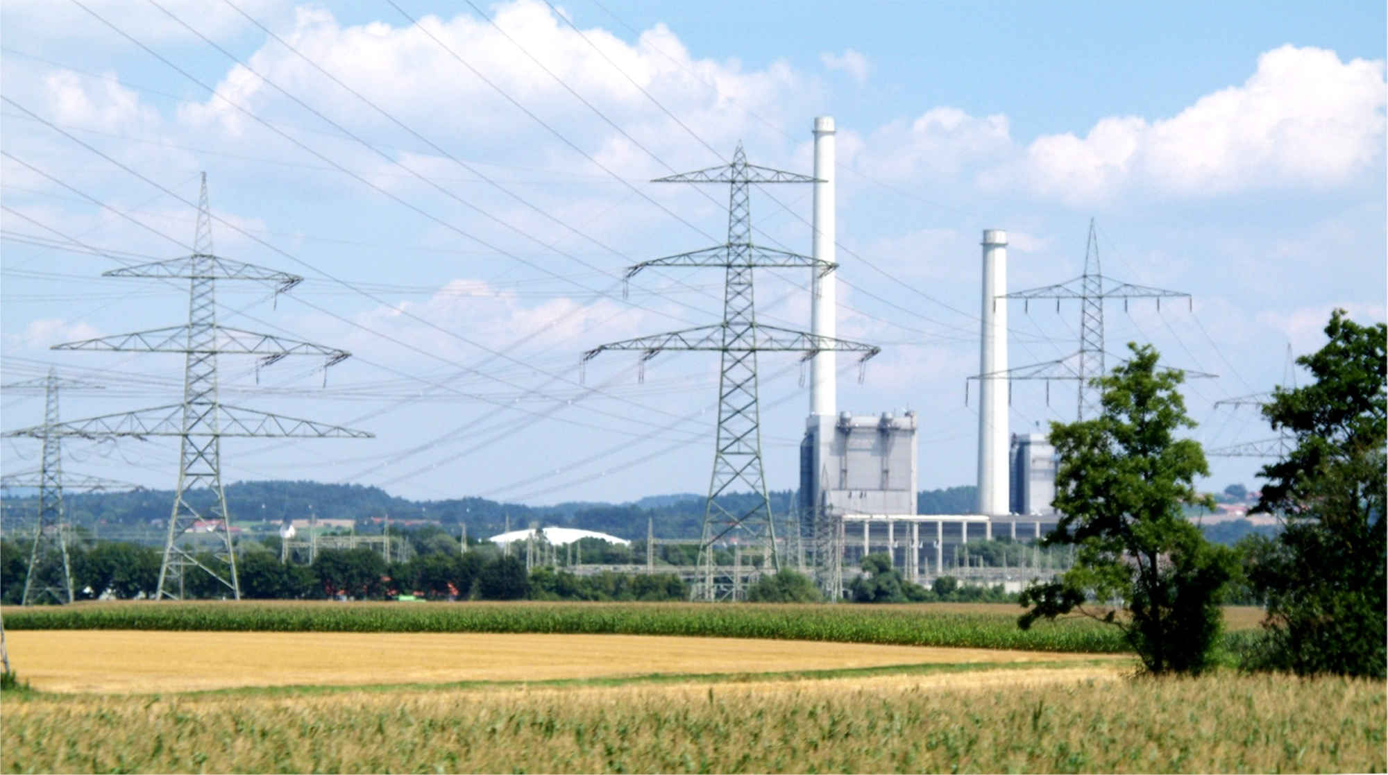 Das Wärmekraftwerk von Pleinting mit einer Leistung (brutto) von 726 MW, das im Jahr 1968 in Betrieb genommen wurde.